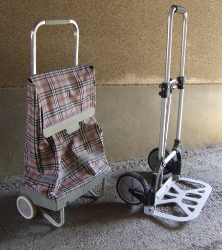 photo perso - ssire